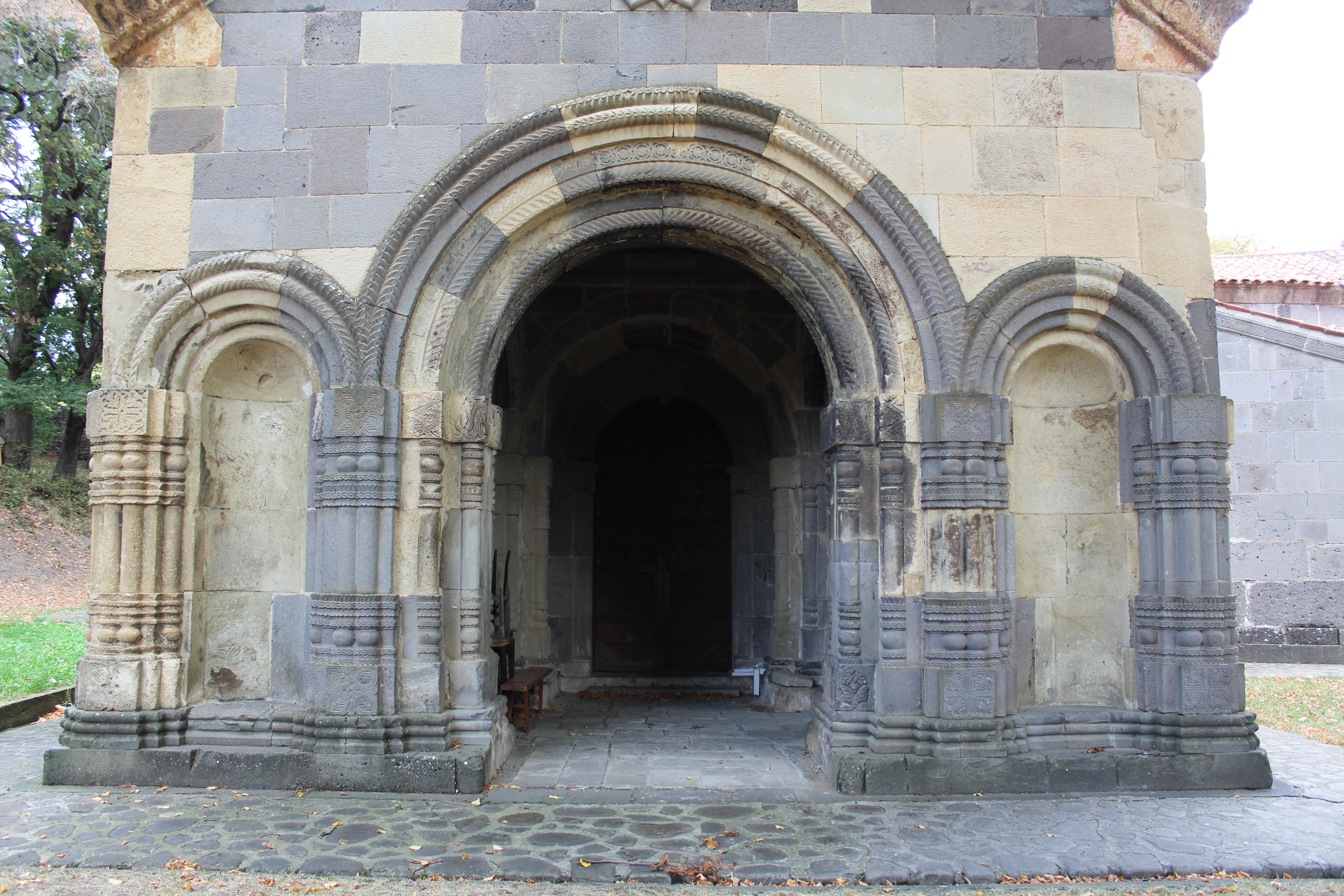 გუმბათიანი ეკლესიაგალავანი და სამრეკლო